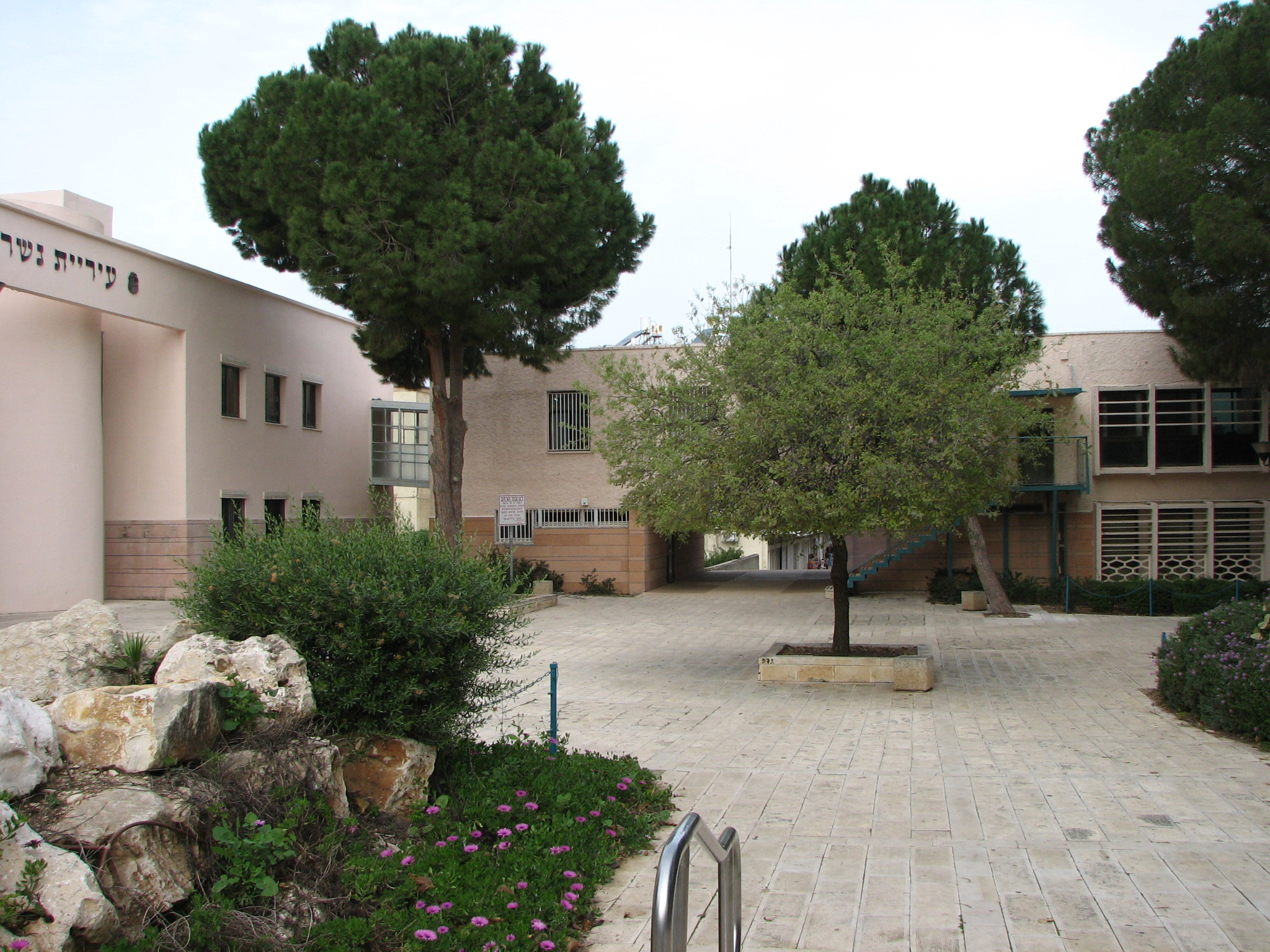 Tel Hanan – Suburb in the city Nesher, Israel שכונת תל חנן בעיר נשר ליד חיפה בניין עיריית נשר